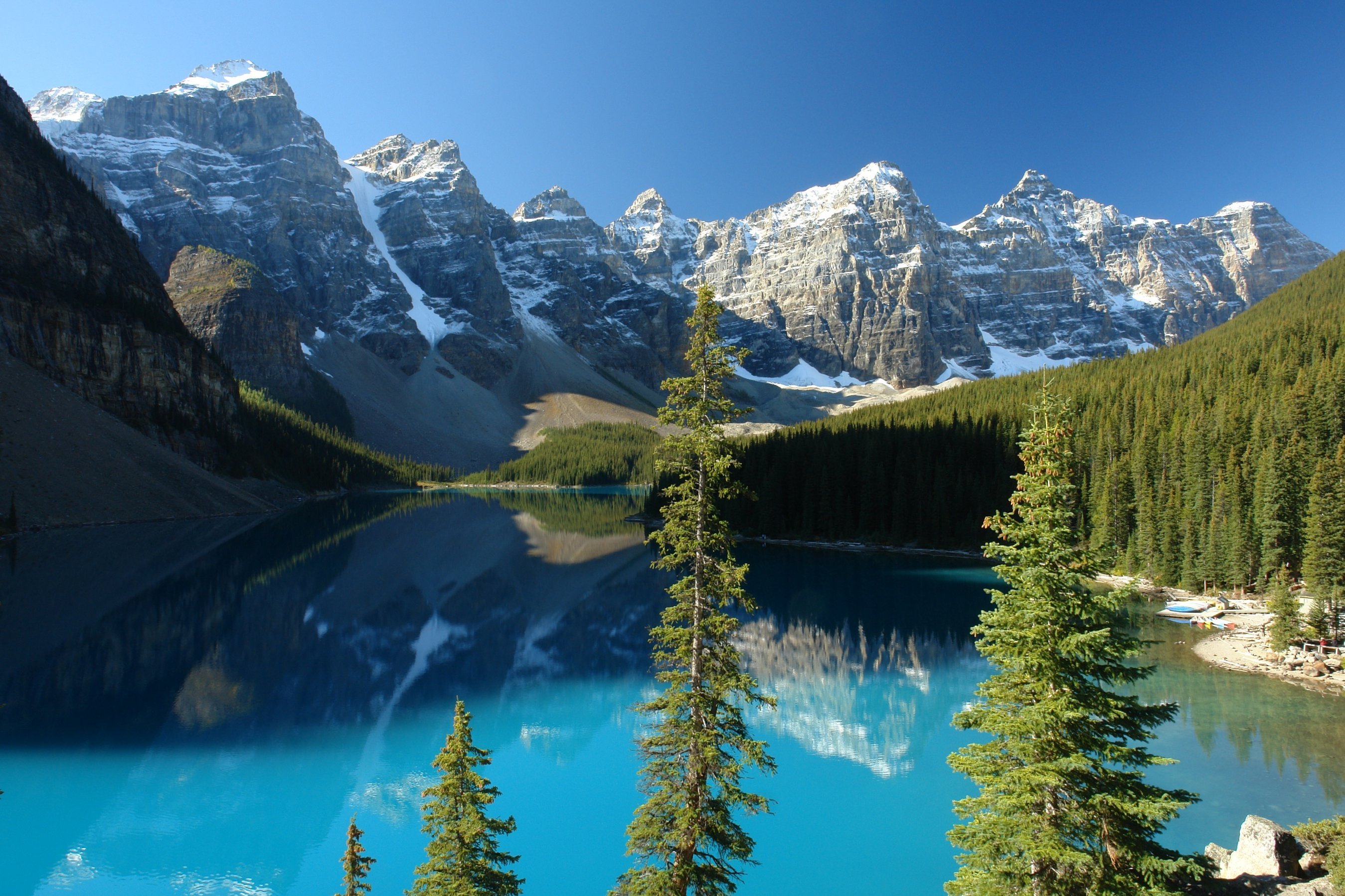 Moraine Lake, Alberta, Canada